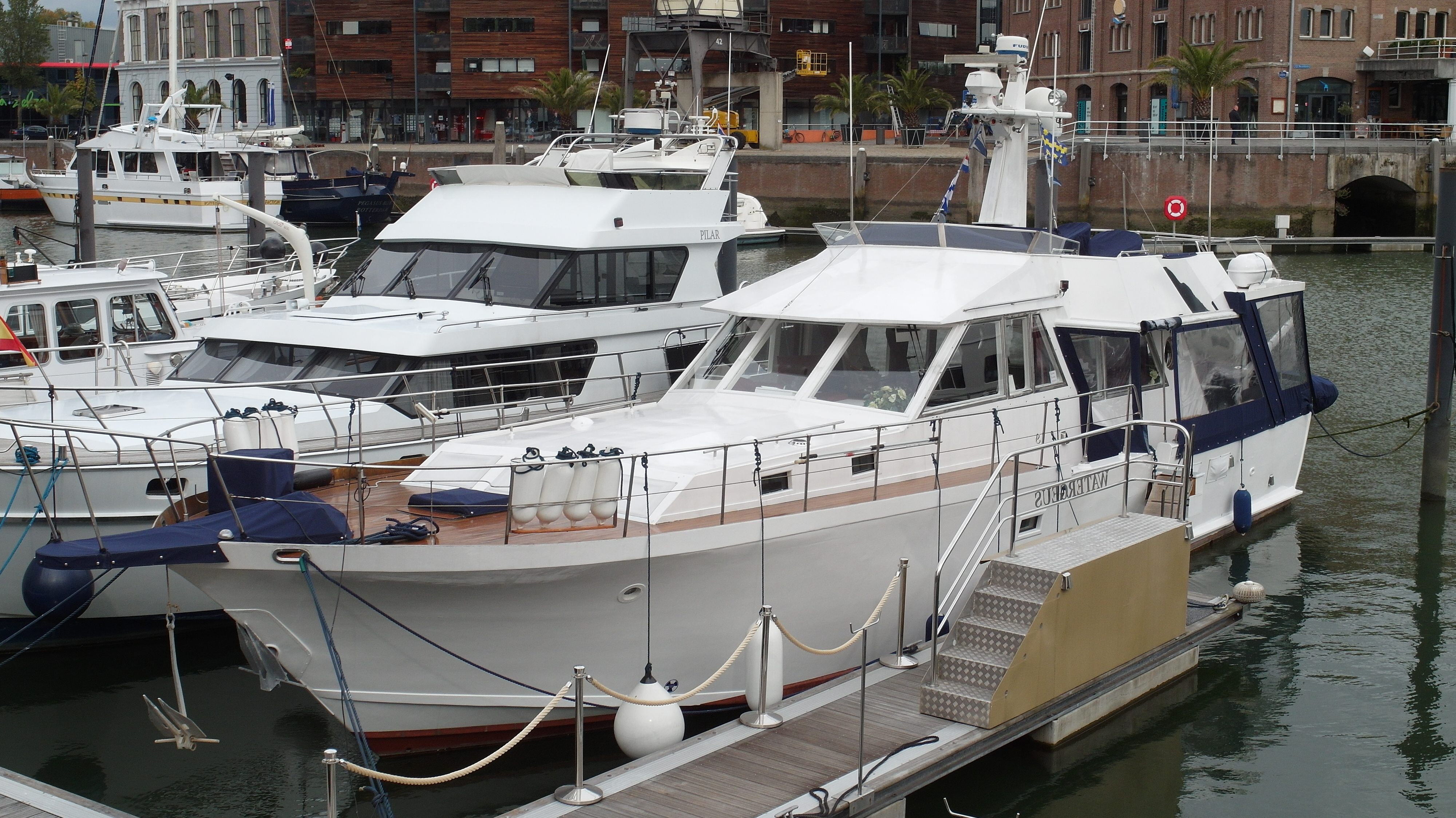 jacht azulon voorheen Alexander Onassis